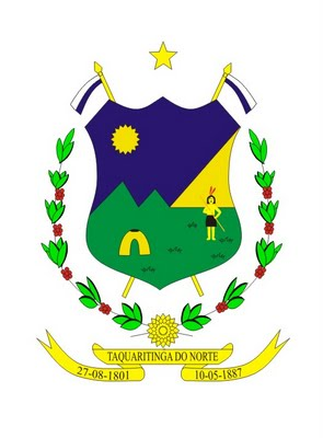 Brasão de Taquaritinga do Norte